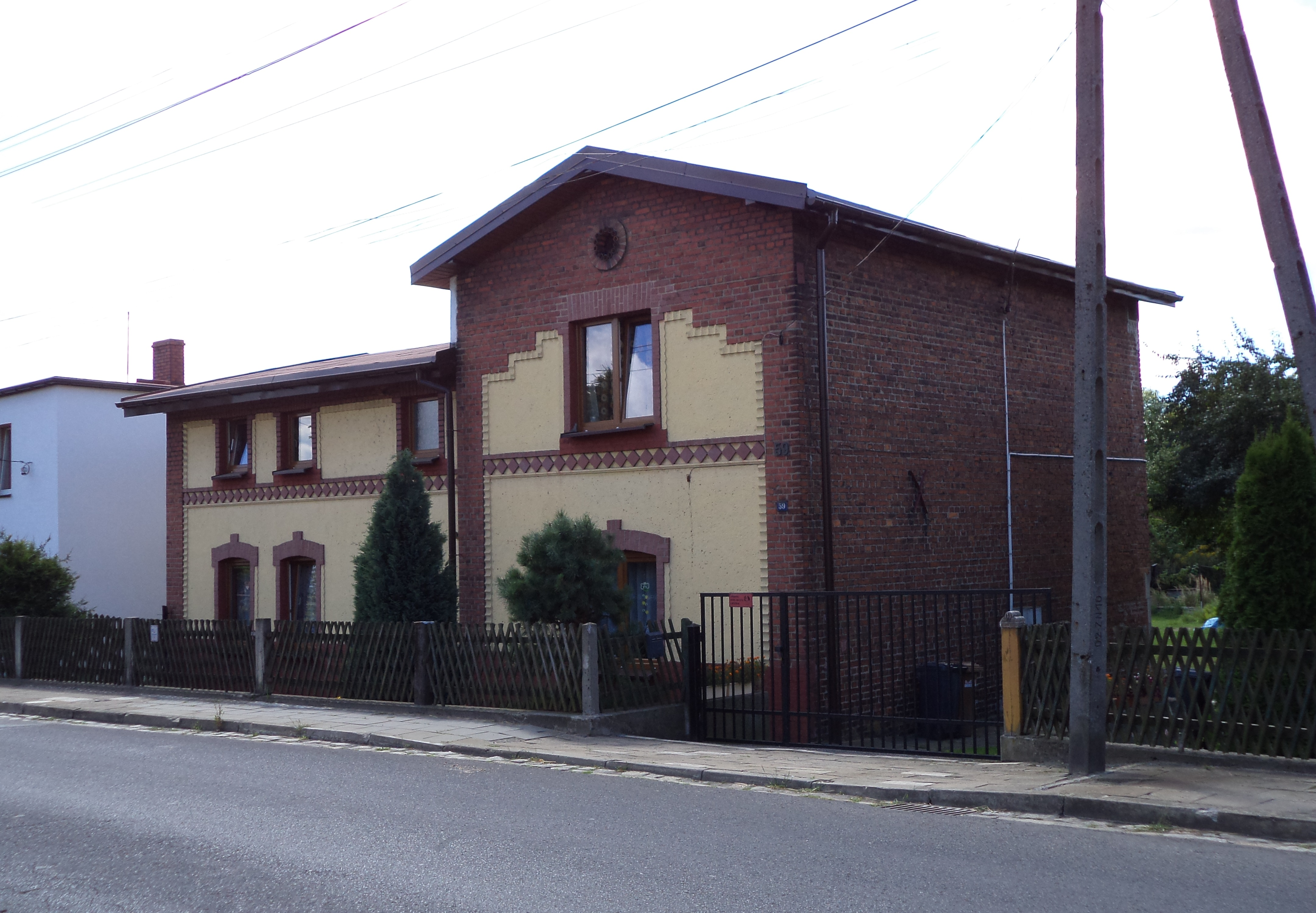 Zabytkowy bud. mieszk. z ok. 1900 przy ul. Grodzkiej 59 w Tarnowskich Górach-Sowicach